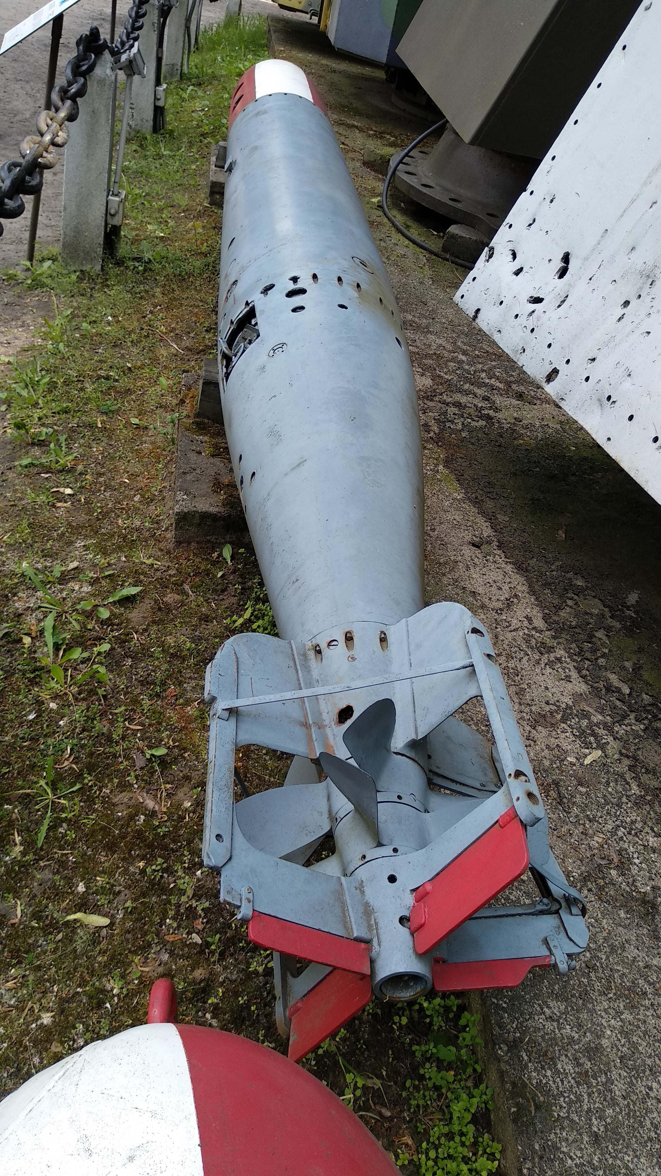 Niemiecka torpeda lotnicza F5b kal. 450 mm eksponowana w Muzeum Wojska Polskiego w Warszawie.